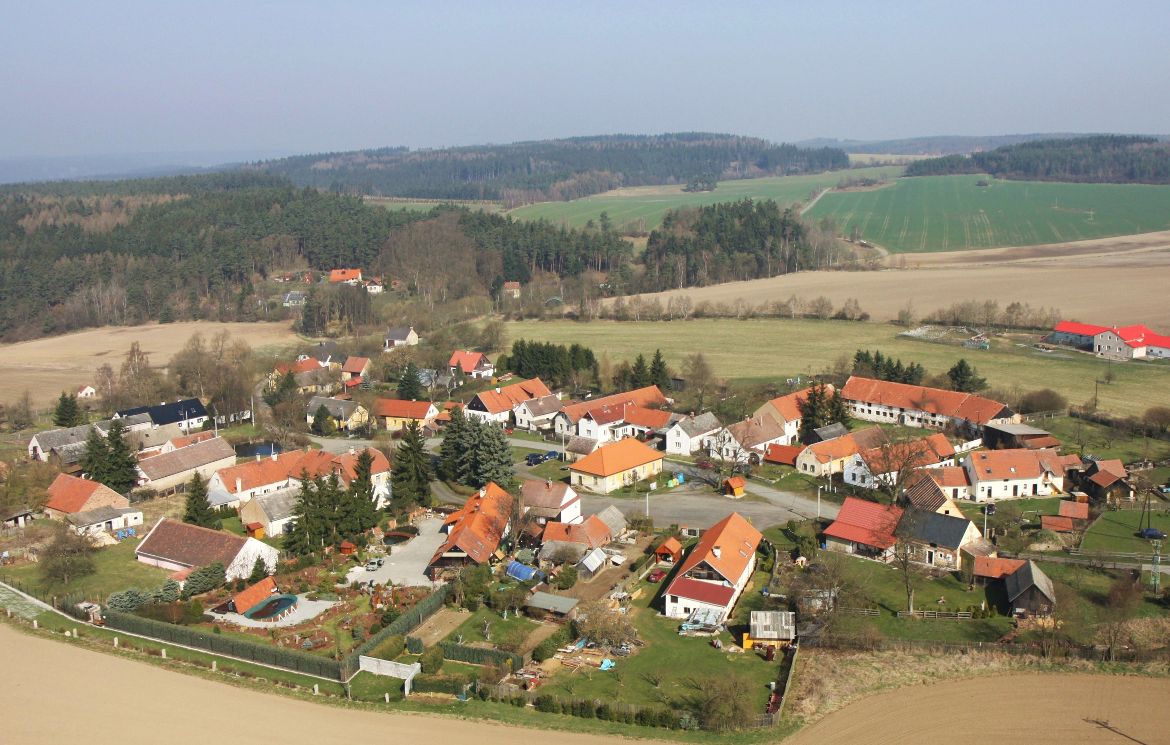 Hluboká, okres Plzeň-sever, pohled z nebe 3